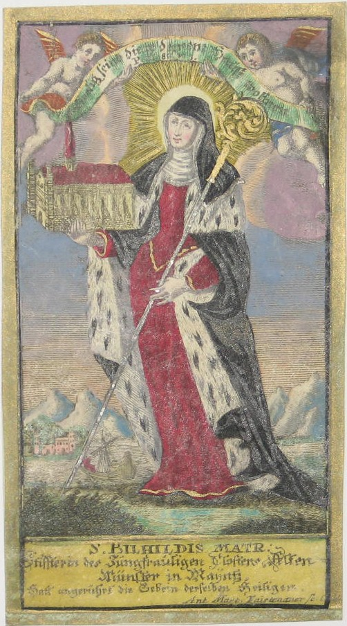 Heilige Bilhildis. Gedruckt auf Pergament. 12*6,5 cm